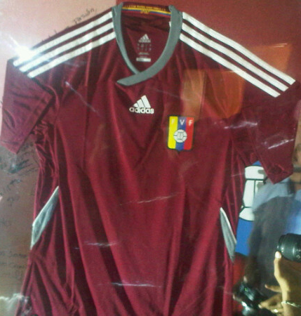 Uniforme Adidas Selección de Venezuela